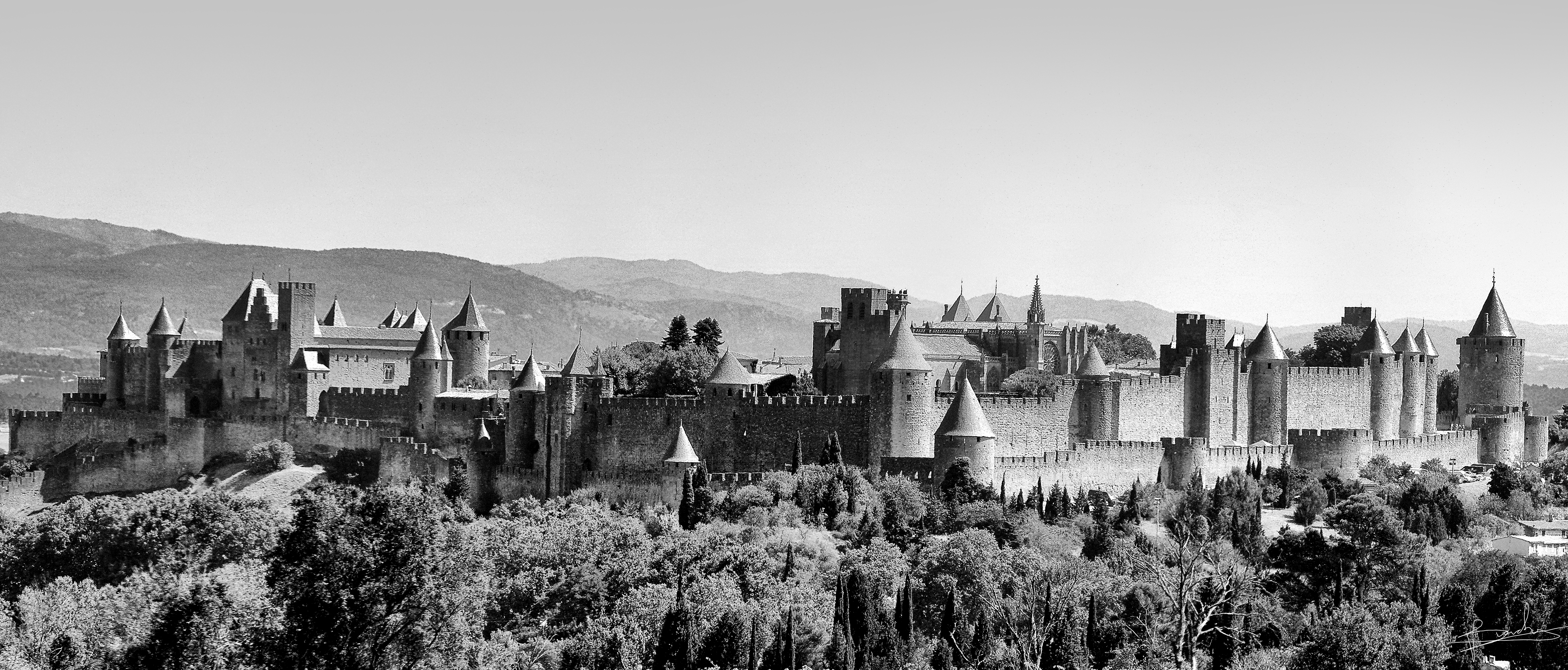 Cité Médiévale .